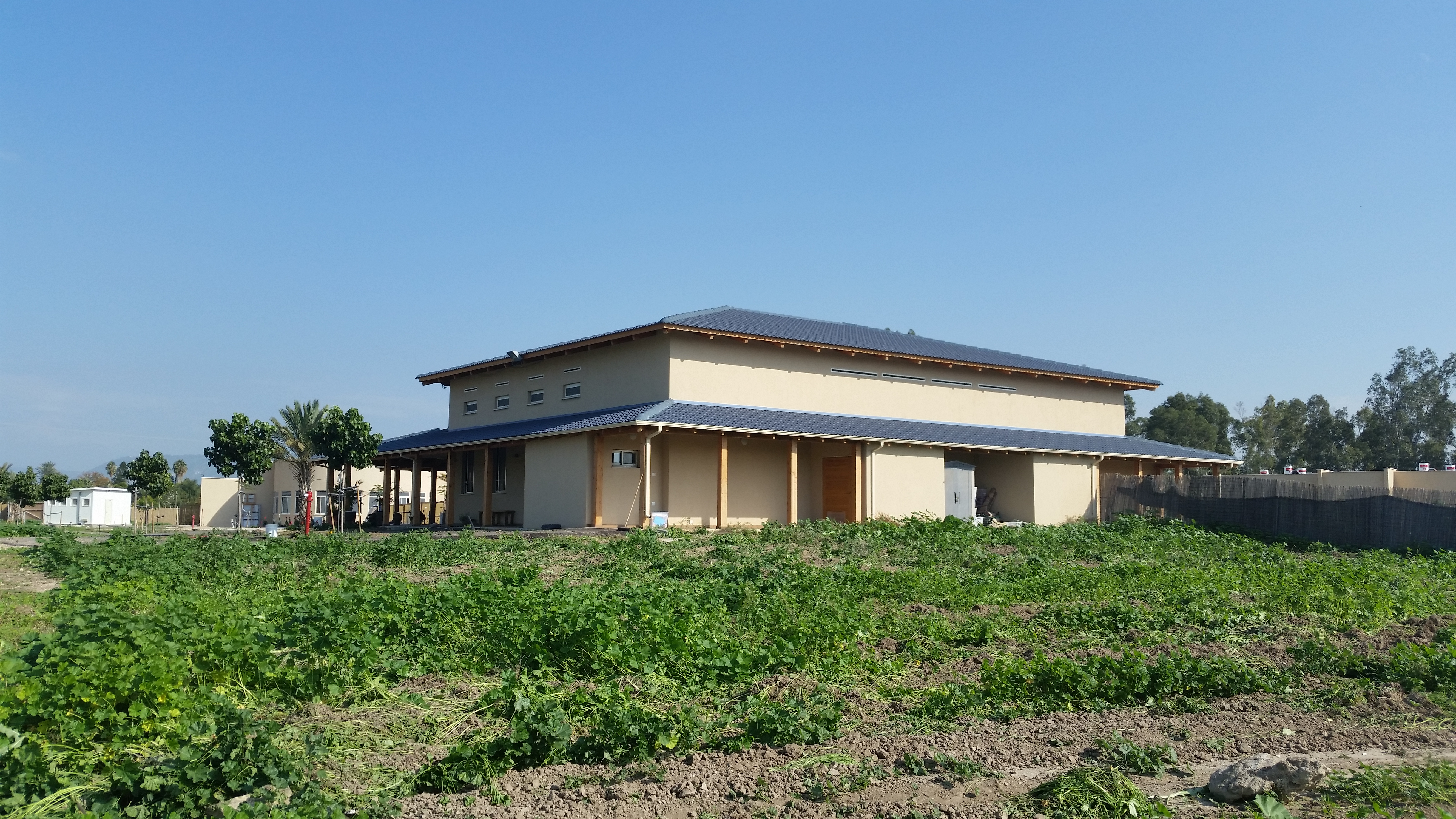 מרכז ויפאסאנה בדגניה ב